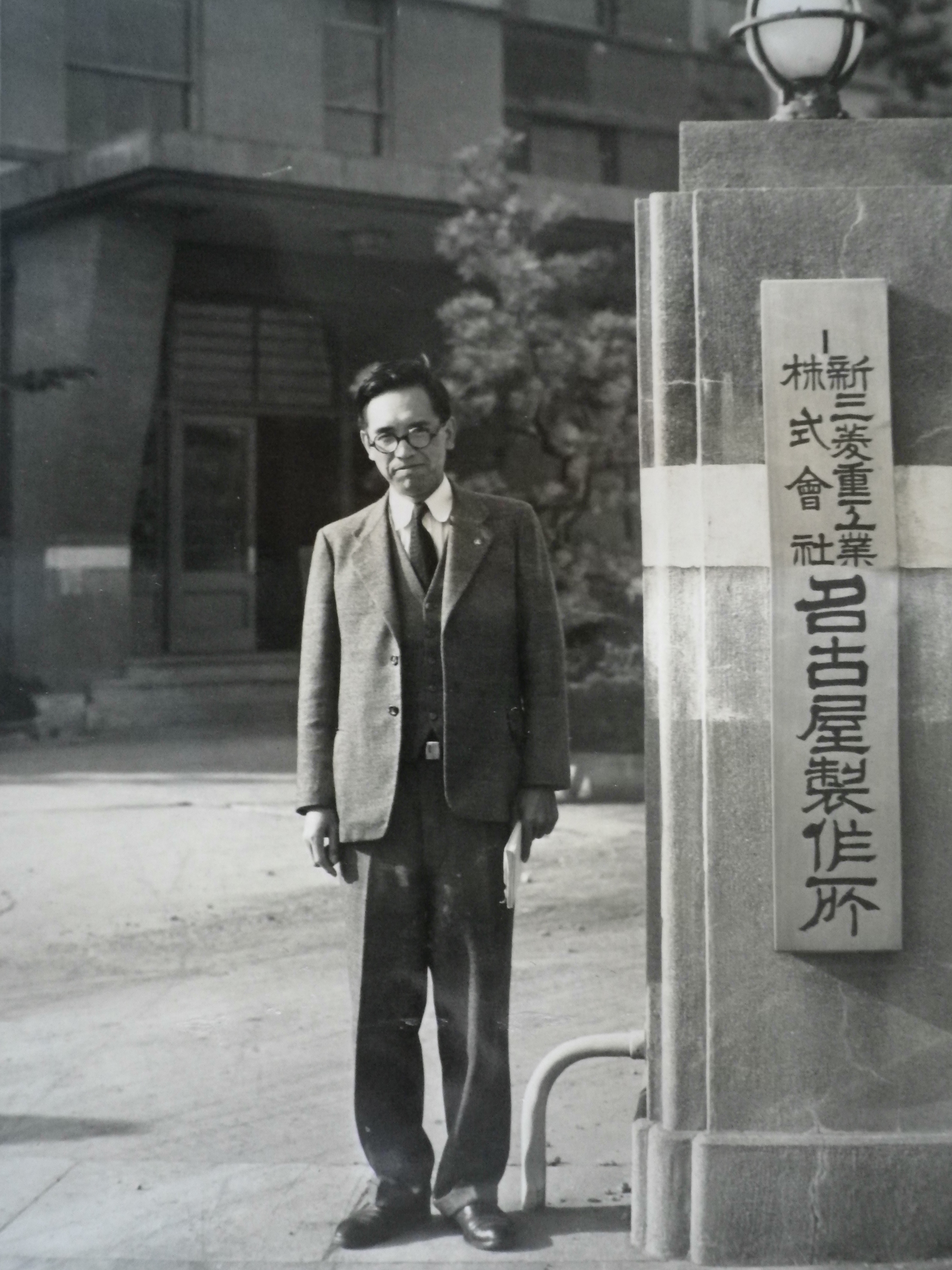 新三菱重工業名古屋製作所、1952年、翠峰が作成